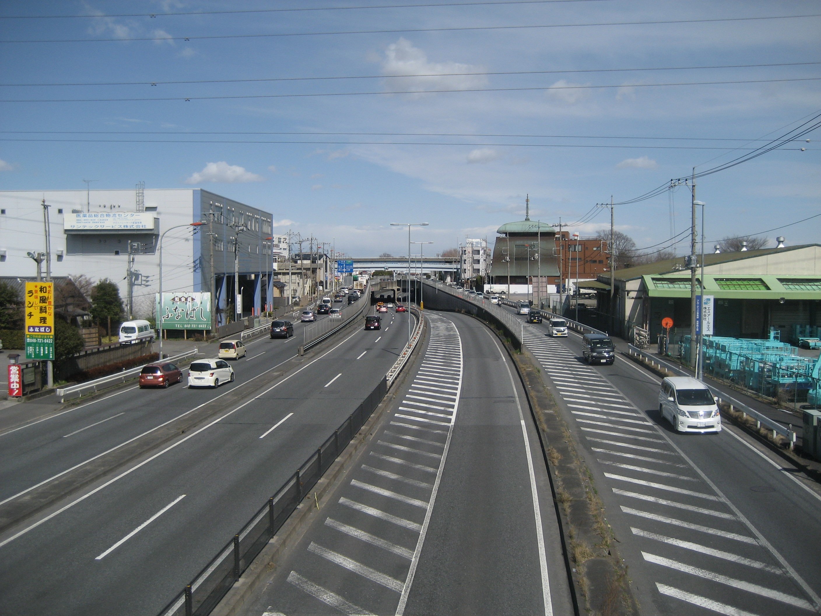 国道16号線（東大宮バイパス）埼玉県上尾市原市付近（岩槻方面を撮影）